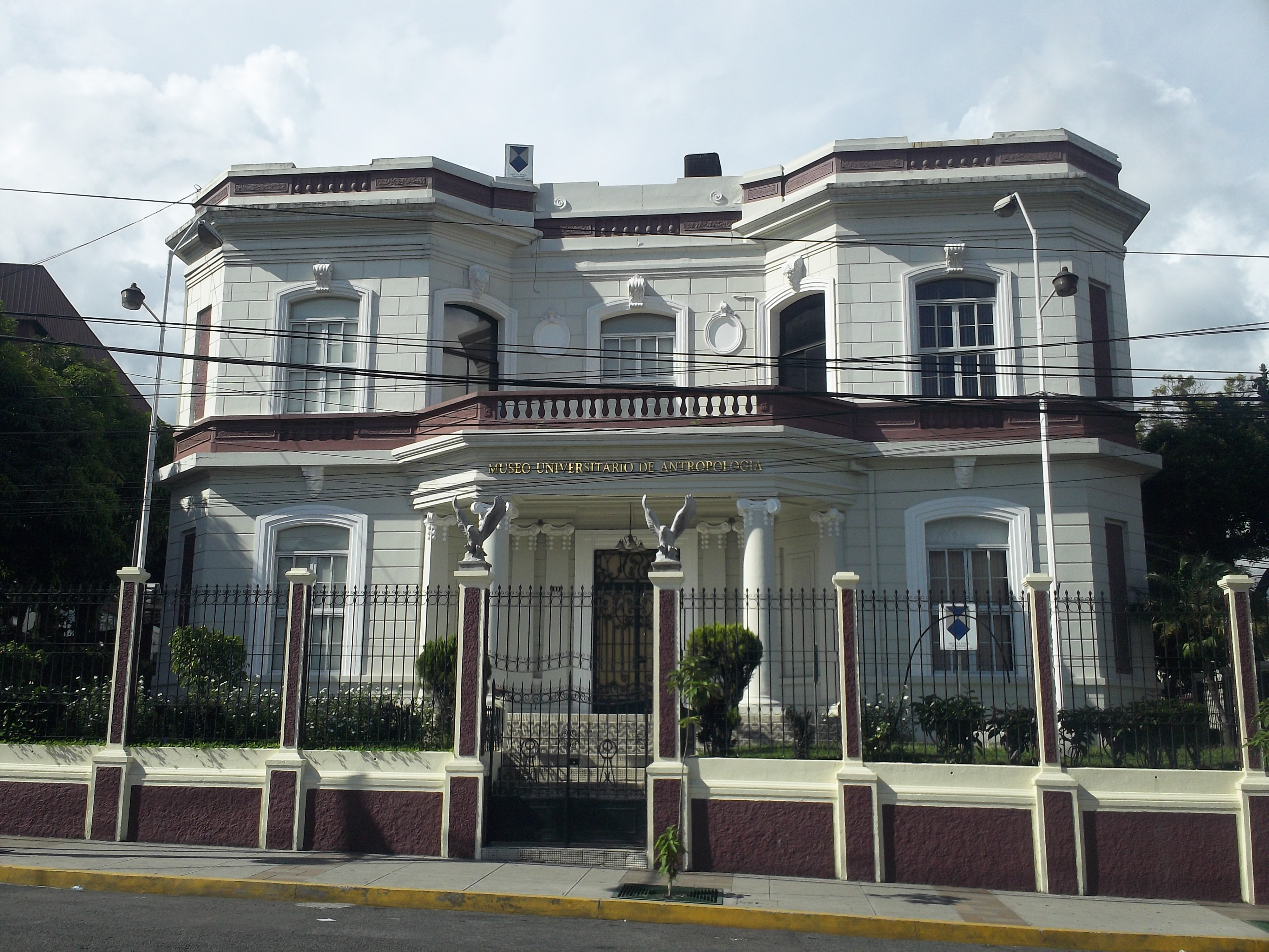 Este museo contiene una exhibición especial del recorrido del migrante.